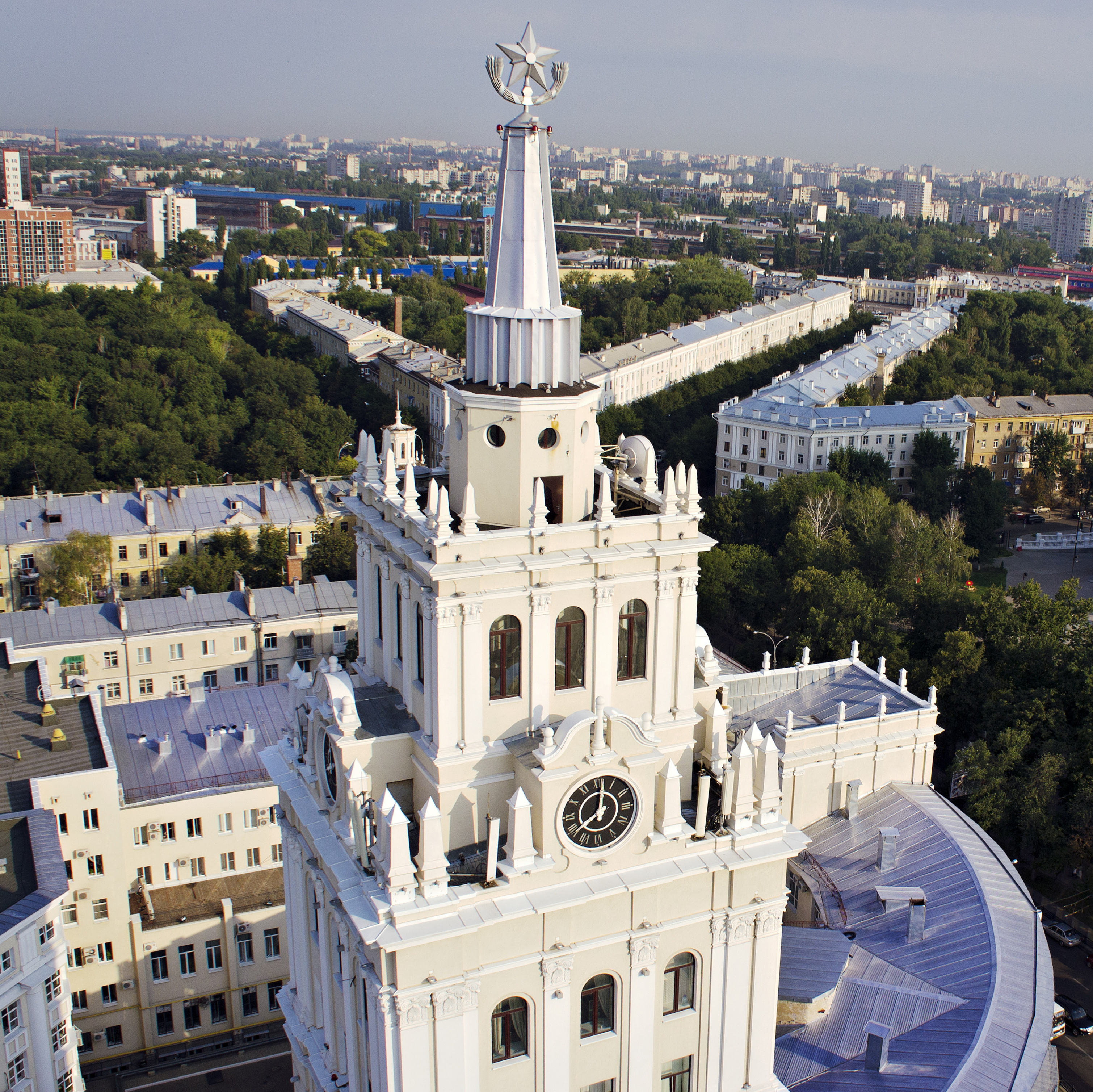 Башня здания управления ЮВЖД